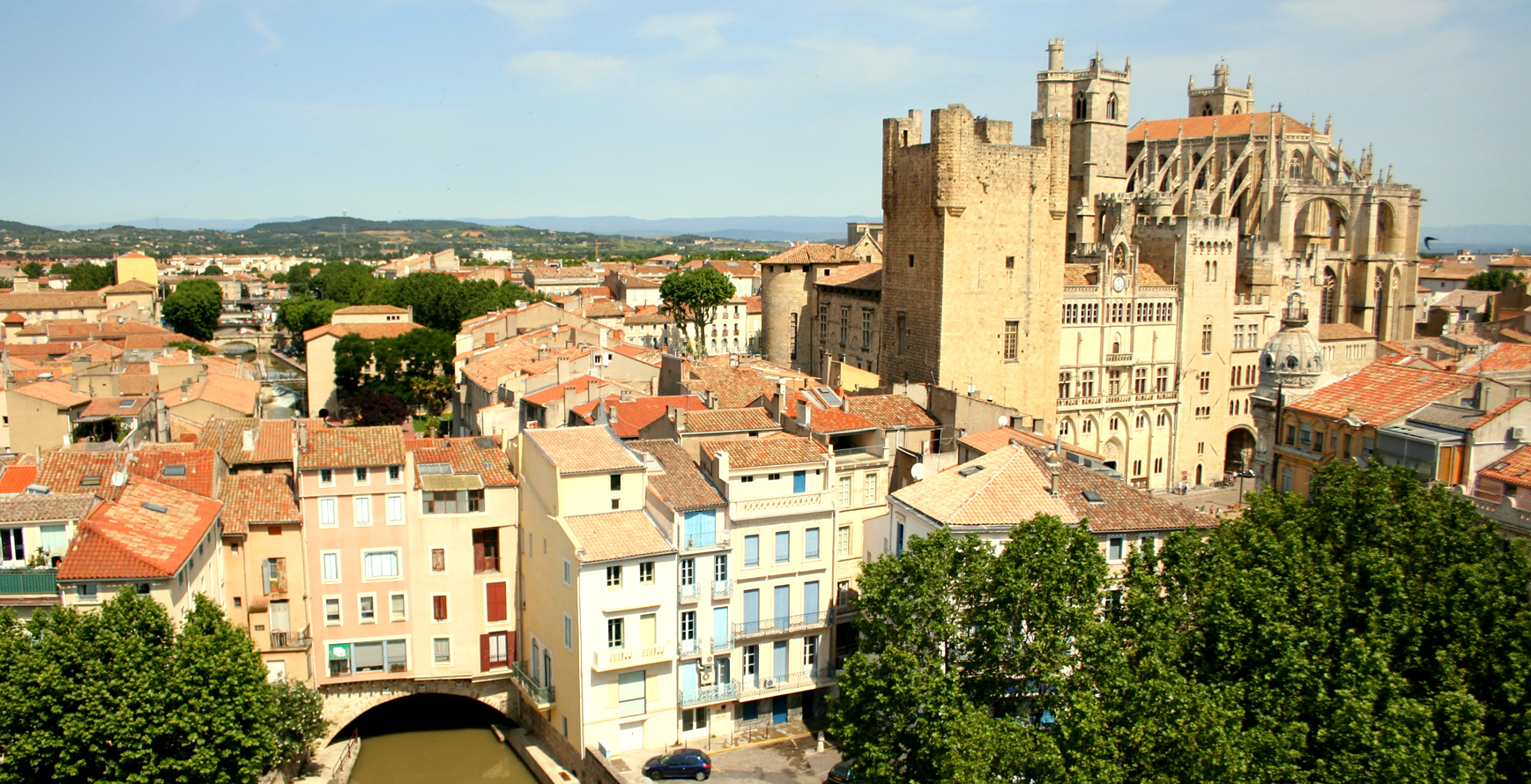 Narbonne, le pont des Marchands et ensemble monumental